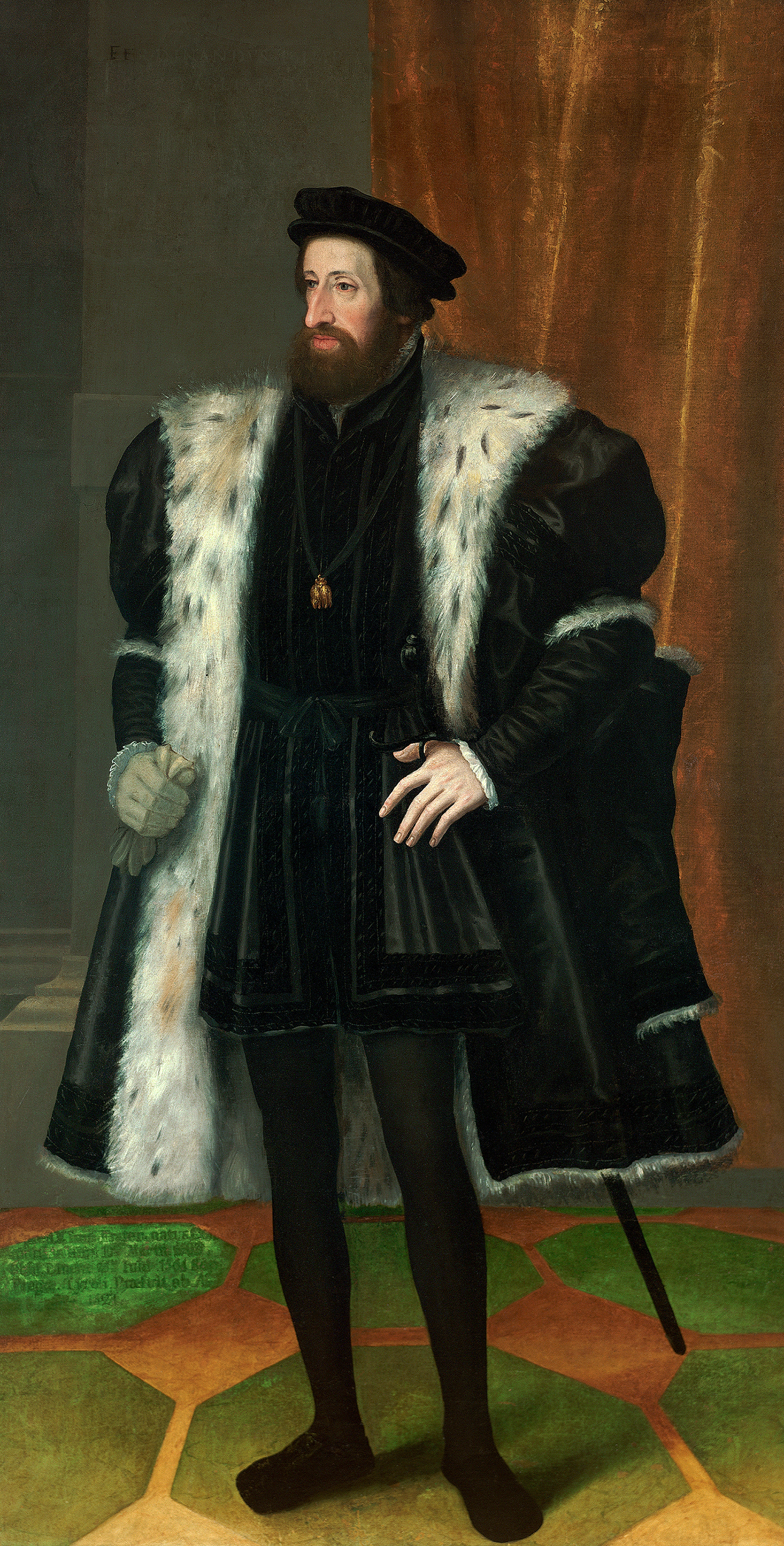 Bildnis in ganzer Figur